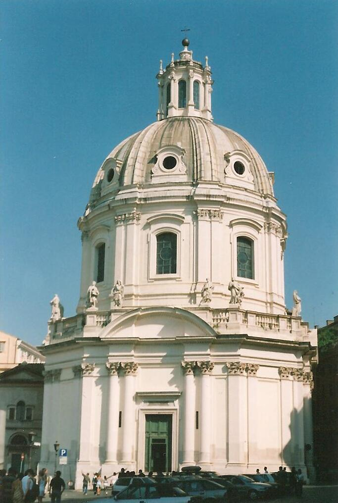 Santissimo Nome di Maria church in Rome, italy